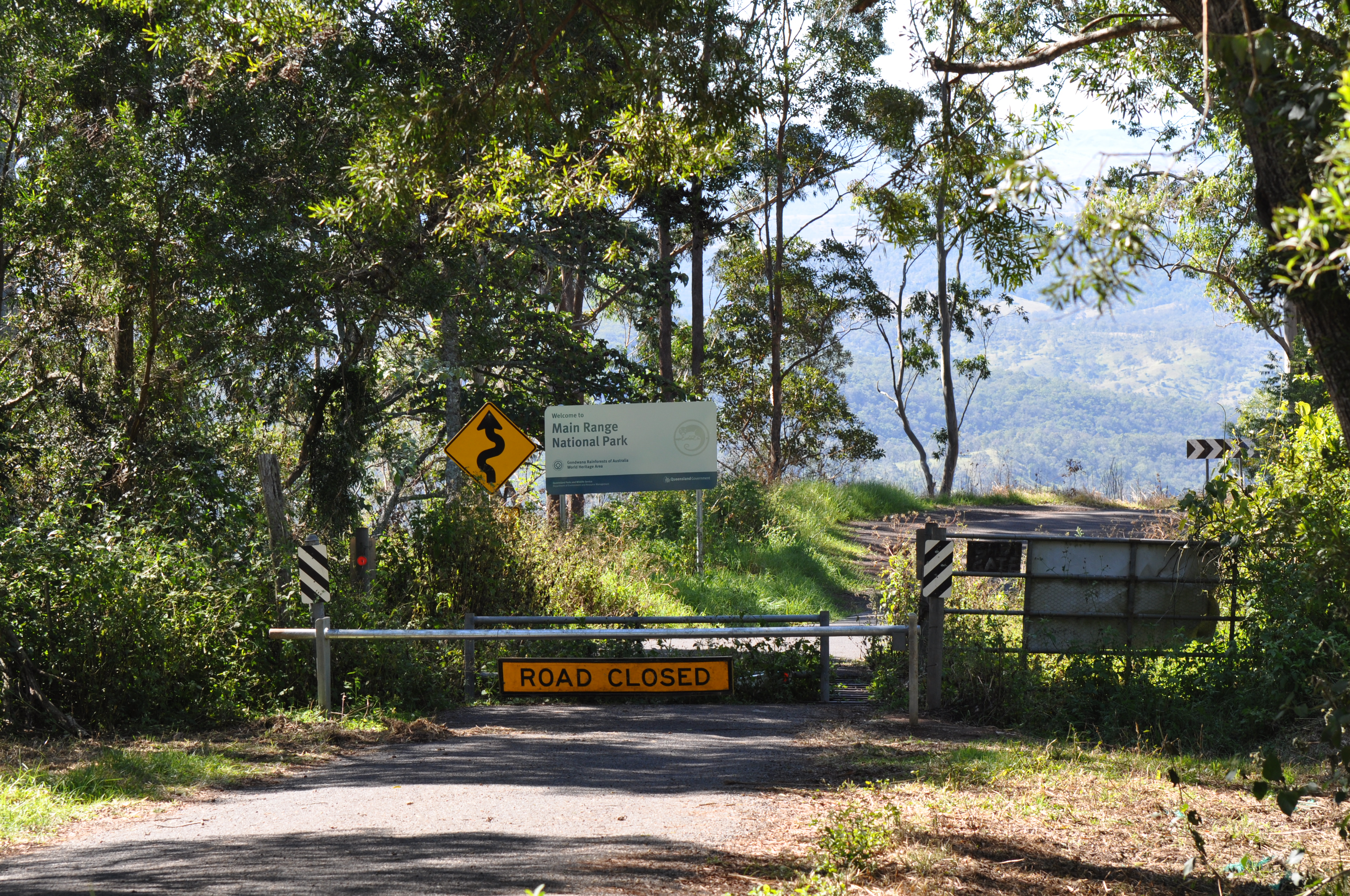 Denial no more